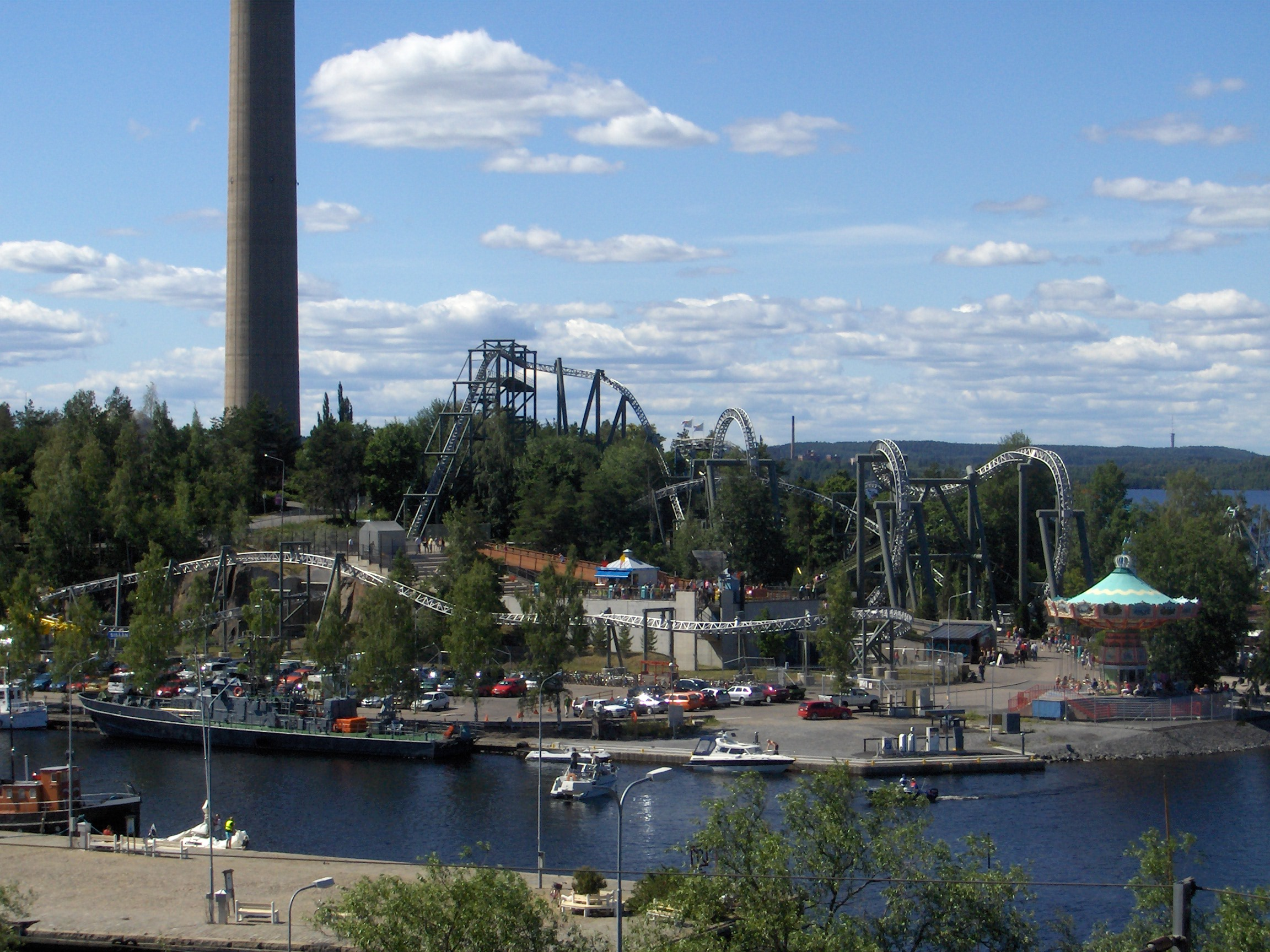 Särkänniemi amusement park in Tampere